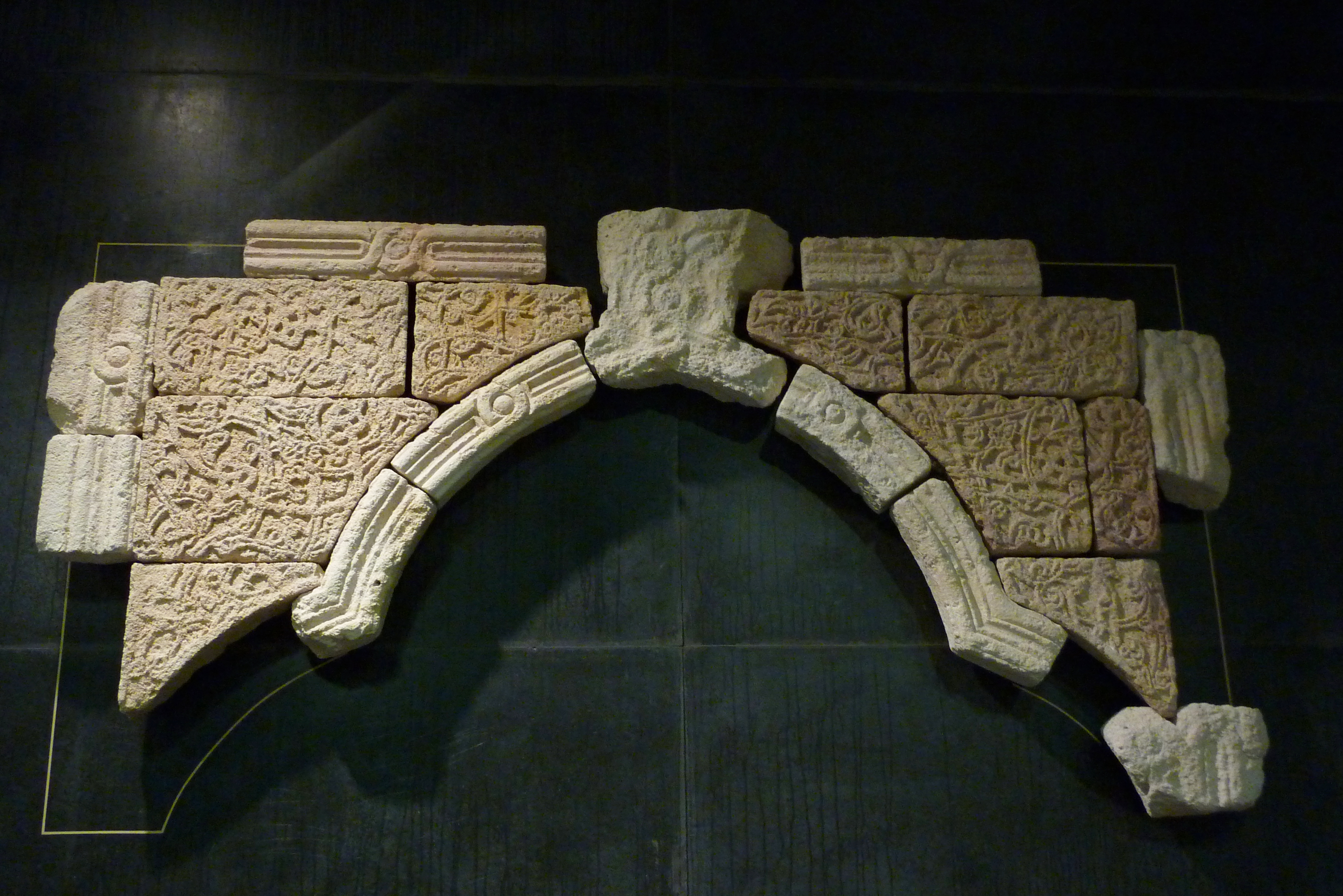 Porche Mamlouk, Torbau eines Wohnhauseses in Kairo aus der 2. Hälfte des 15. Jahrhunderts; Abteilung Kunst des Islam im Louvre in Paris